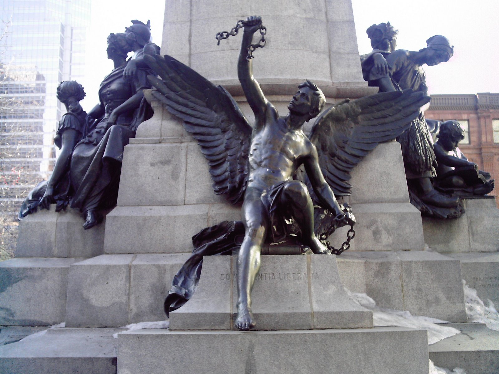 Génie ailé du Monument à Édouard VII, square Phillips, Montréal